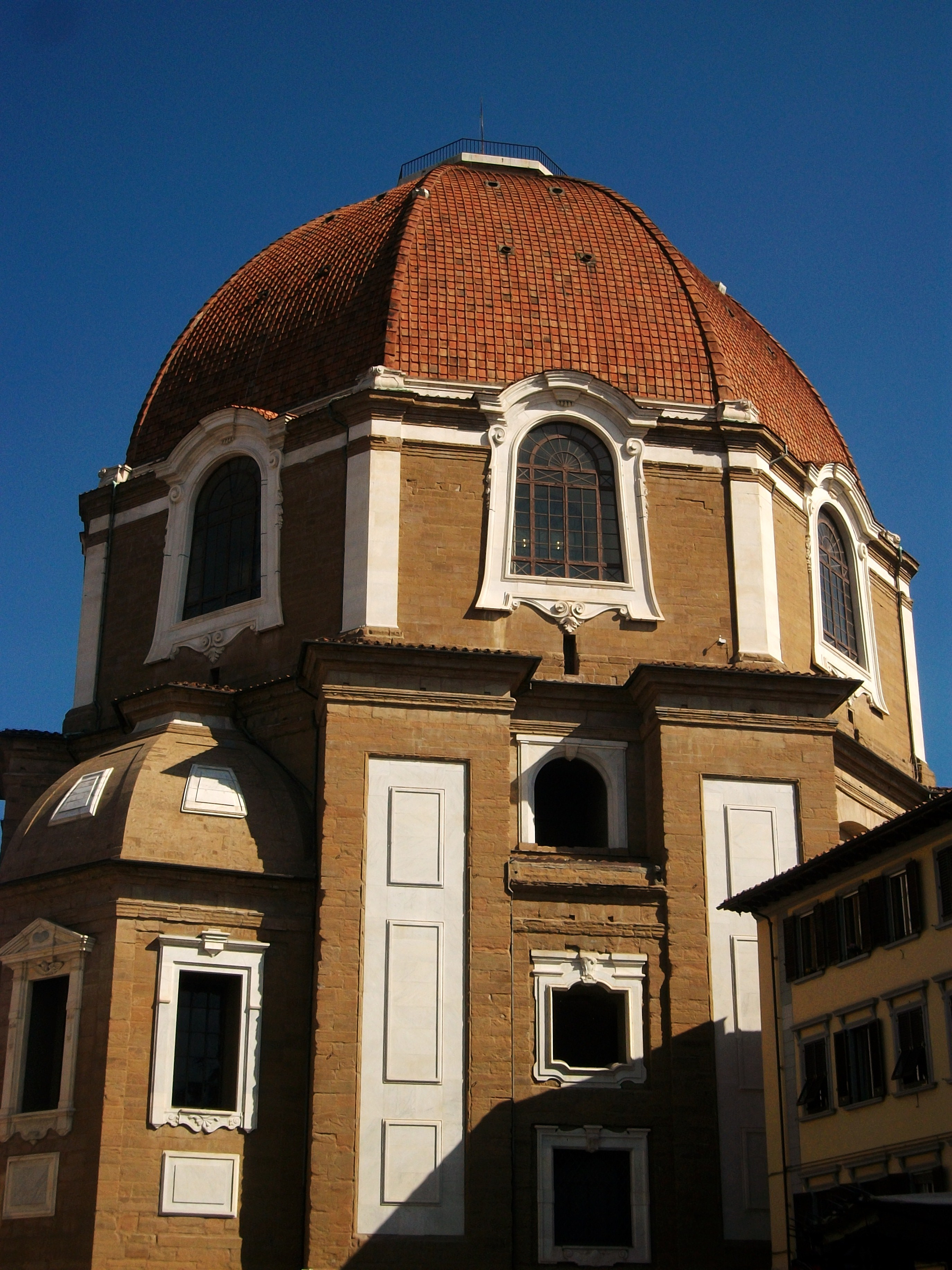 Capella Mèdici o dels Prínceps.